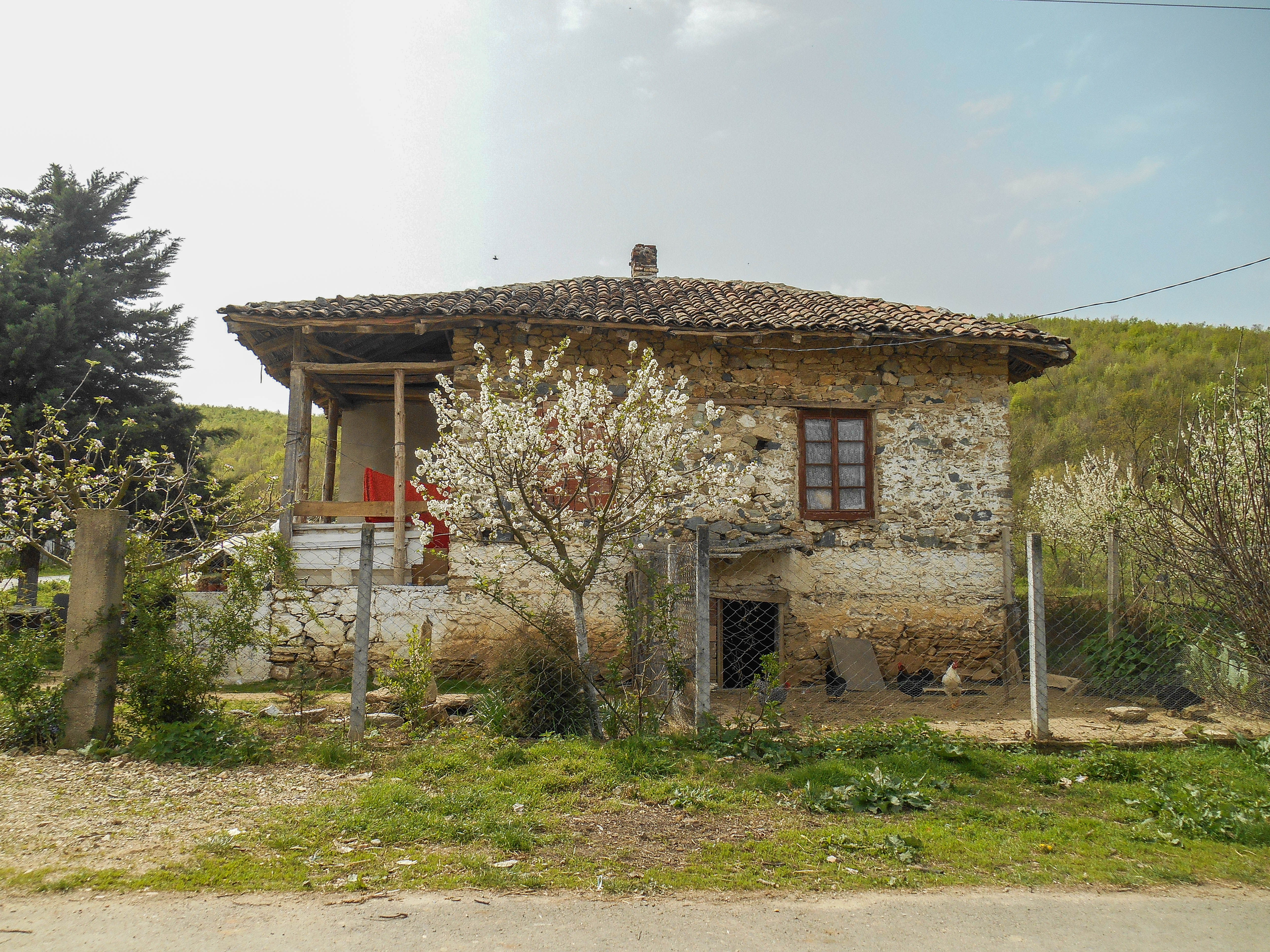 Куќа во Раборци